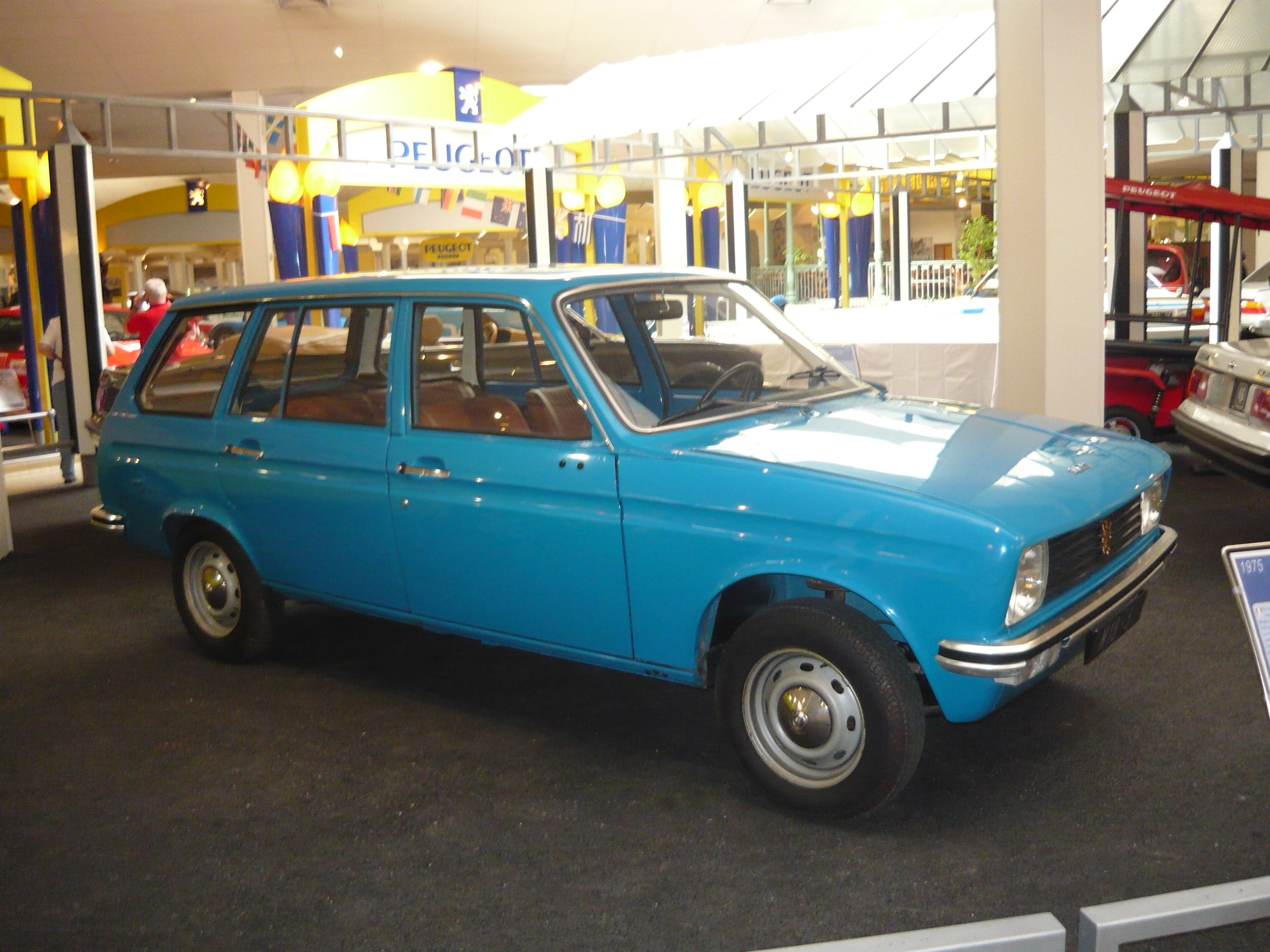 Prototype de Peugeot 104 break, jamais produite en série